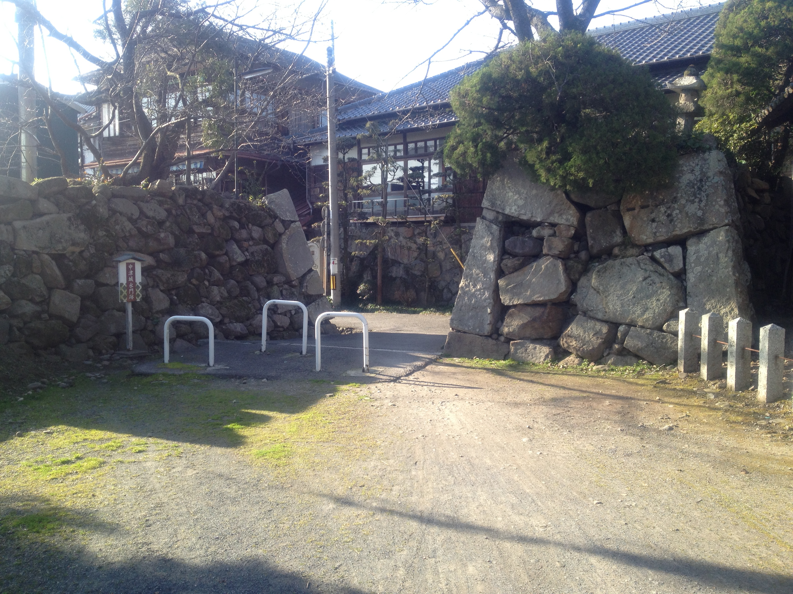 豊後国中津城本丸の南西部にあった水門の跡。